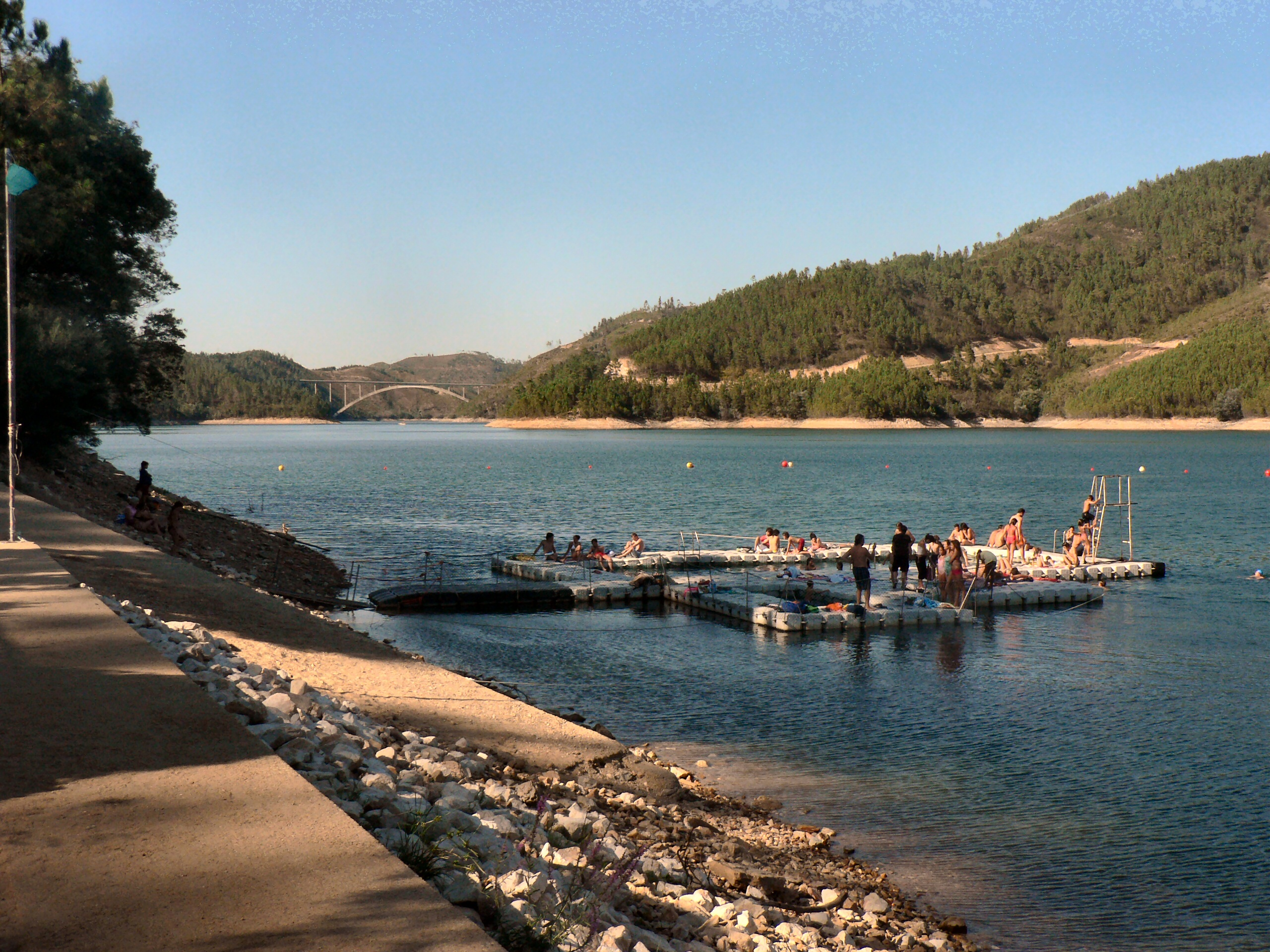 Praia Fluvial da Castanheira (Lago Azul) em Ferreira do Zêzere